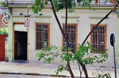 Um dos casarões que foram tomabados pelo patrimônio histórico, e que hoje é uma das mais conhecidas Chopperias da cidade de São Paulo. Localizam se ao lado da Igreja Matriz de Nossa Senhora do Ó.